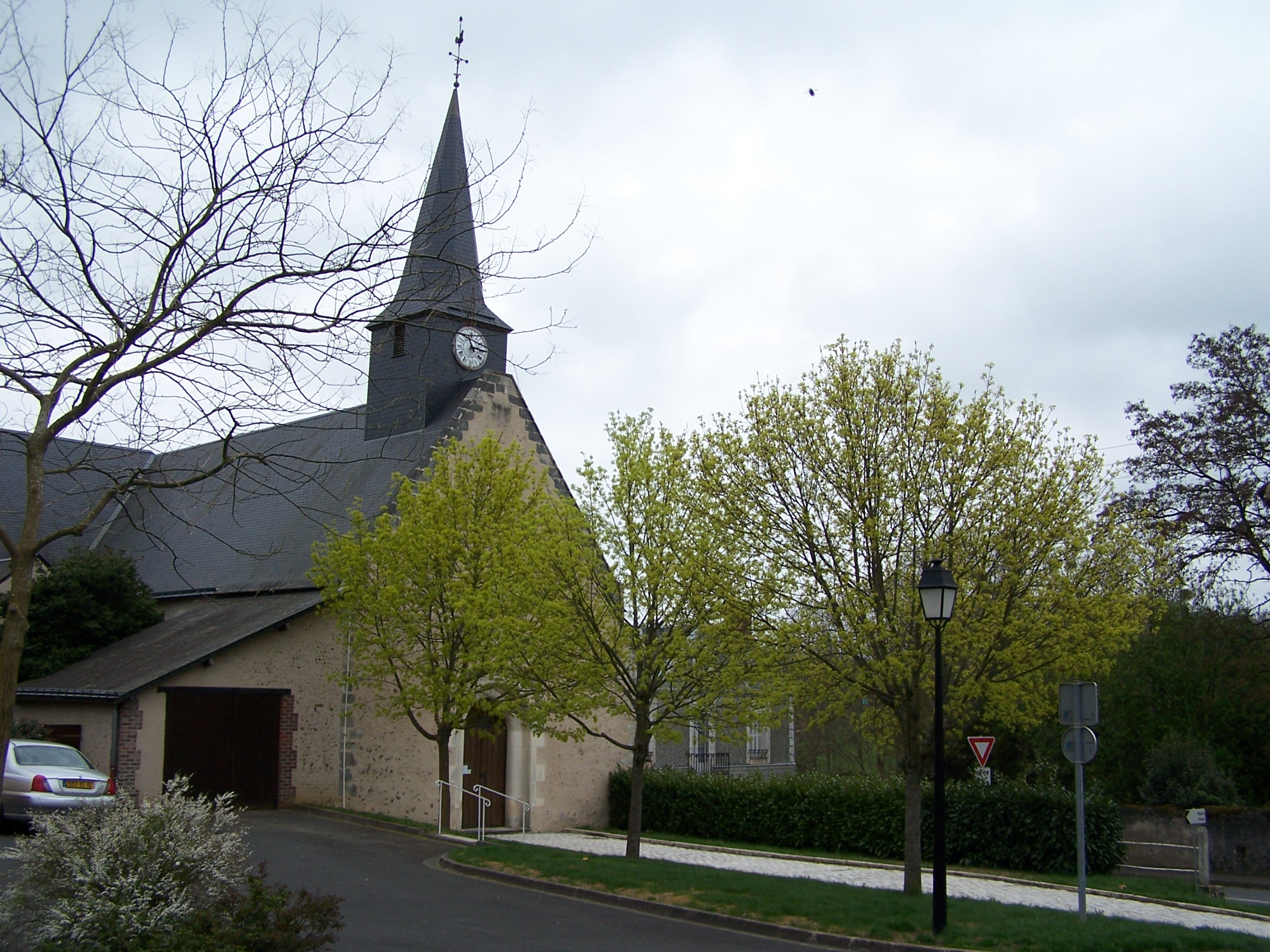 Eglise de Monthodon (Indre-et-Loire, France)